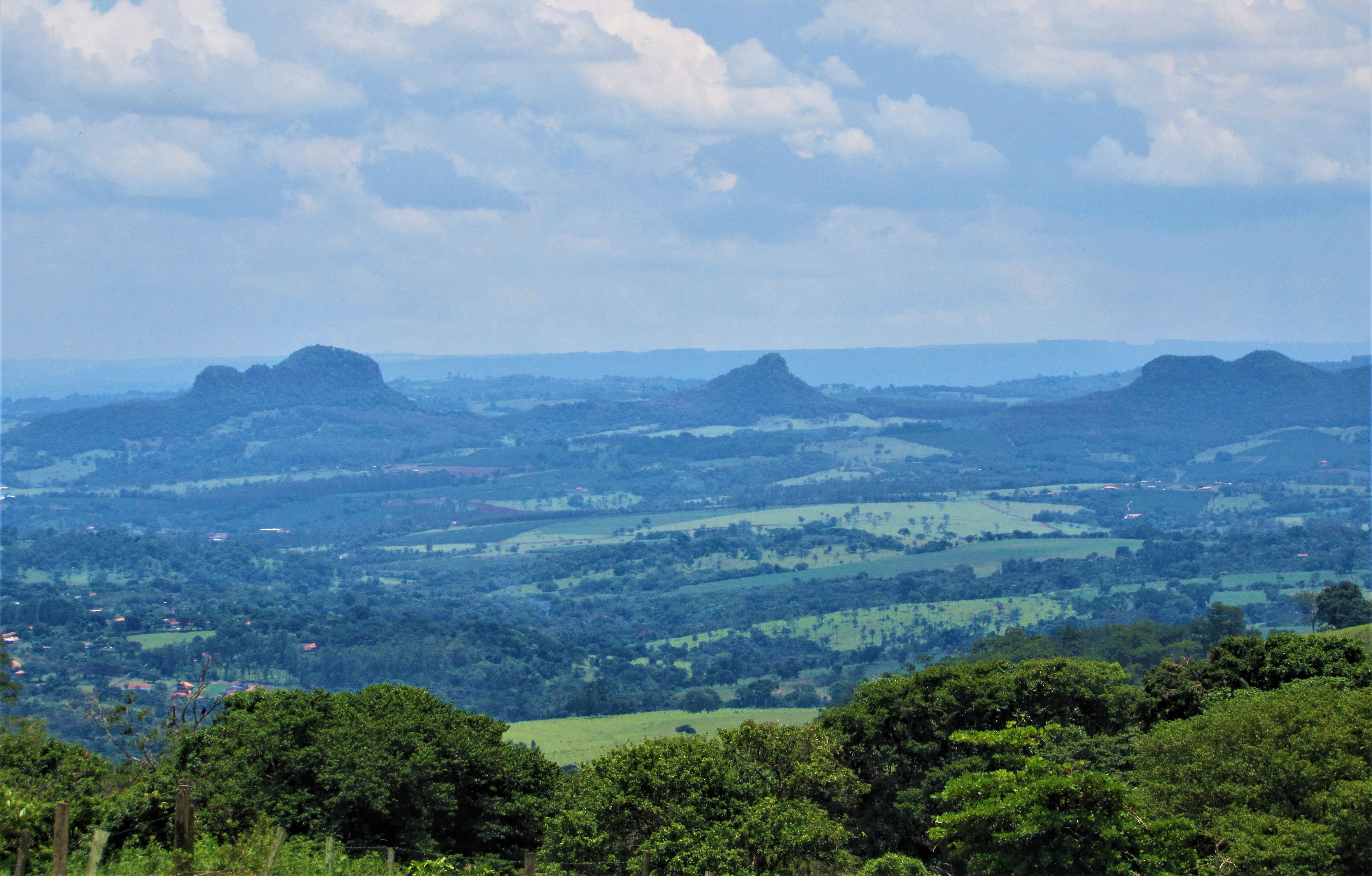 Região montanhosas próximas a Franca e bem no fim do horizonte a região da Serra da Canastra. Esse visão é possível a partir do final da Avenida Brasil esquina com a rua Antônio Pizani, em Franca, Brasil.